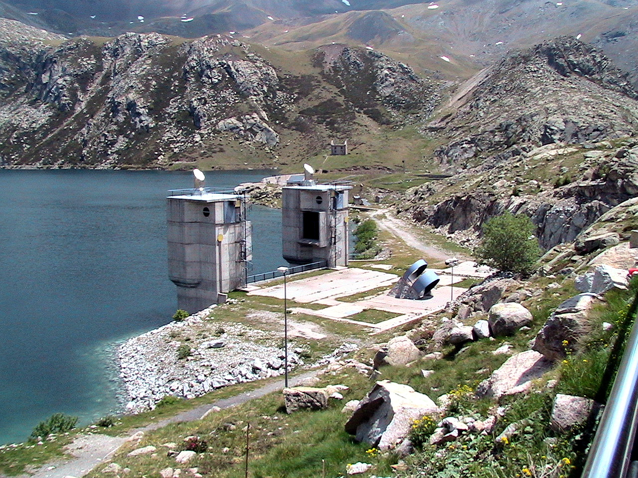 La presa de les aigües de la central reversible d'estany Gento. Cabdella (Pallars Jussà)